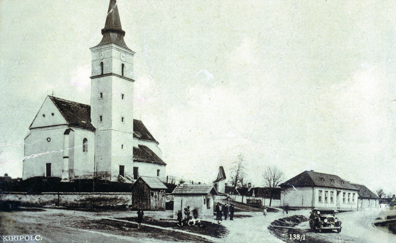 Деревня Костолиште. Архивное фото